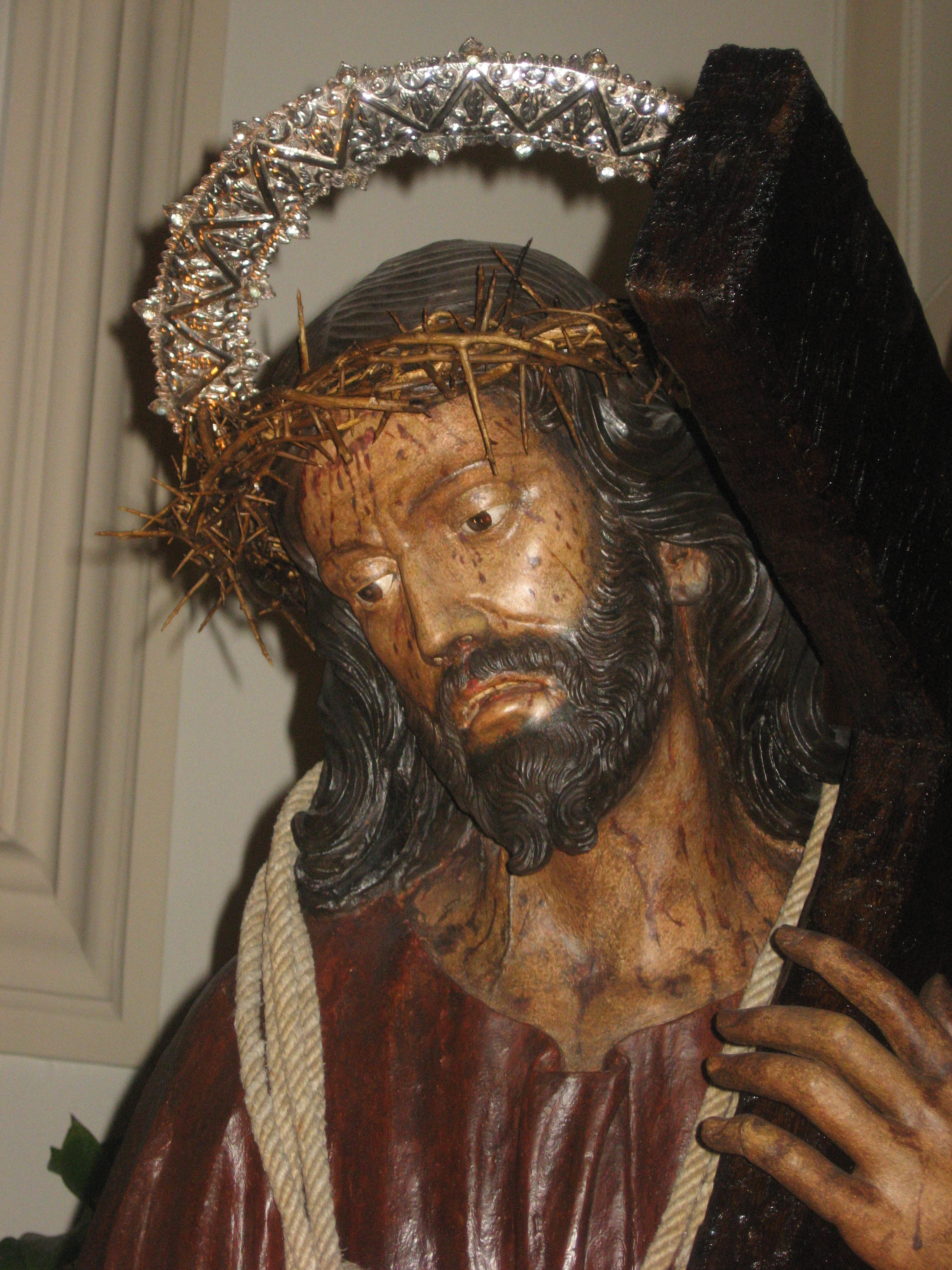 Gesù calvario ruvo di puglia 2012 primo piano